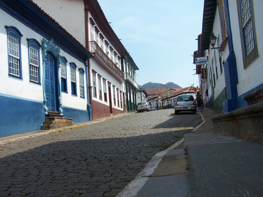 Rua D. Pedro II de Sabará - MG, Brasil.